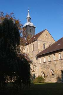 Eigenes Digitalfoto vom 19.10.2003 (JBO) Zum Artikel selbst angefertigt Juergen Bode 18:09, 13. Jul 2004 (CEST)